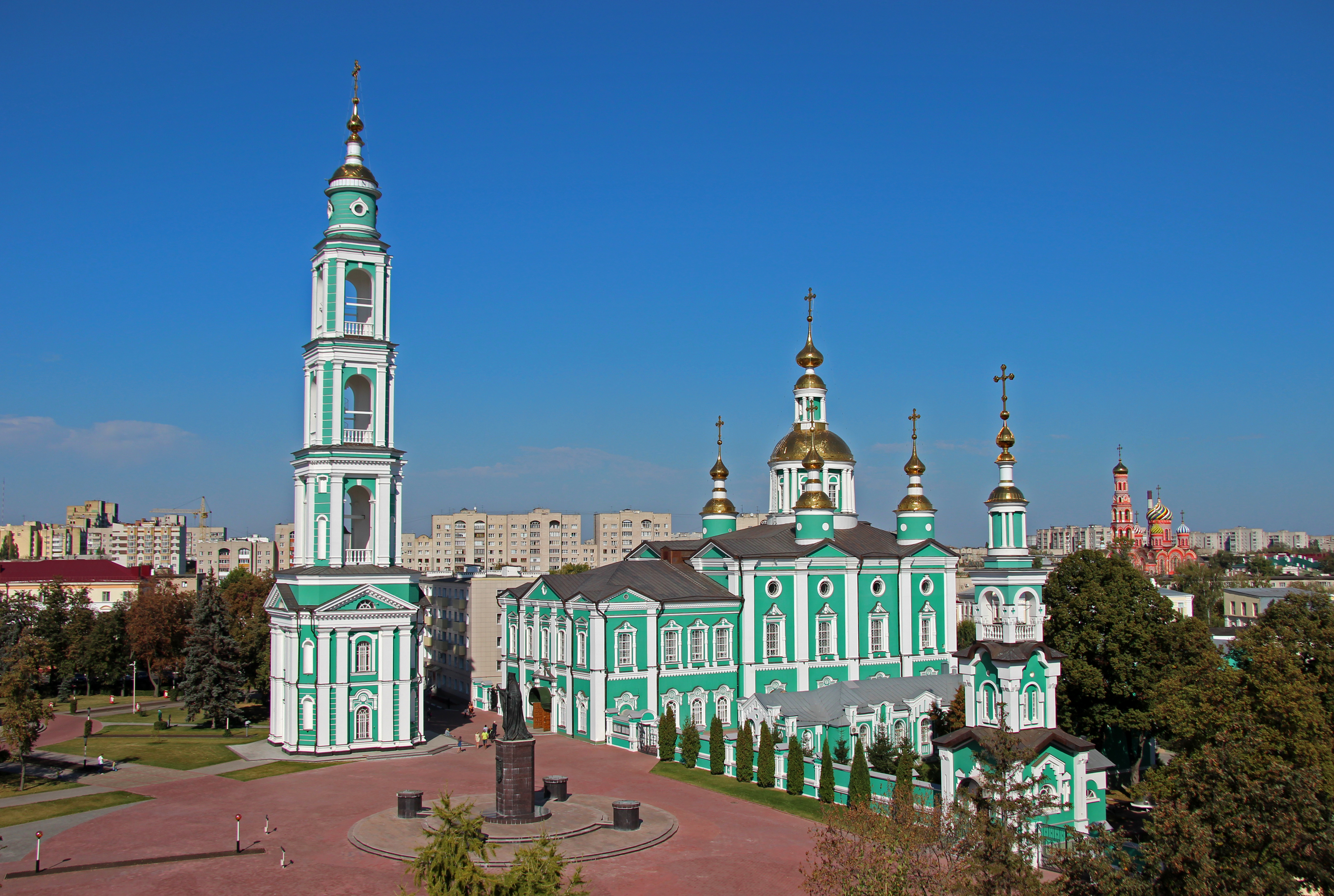 Соборная площадь